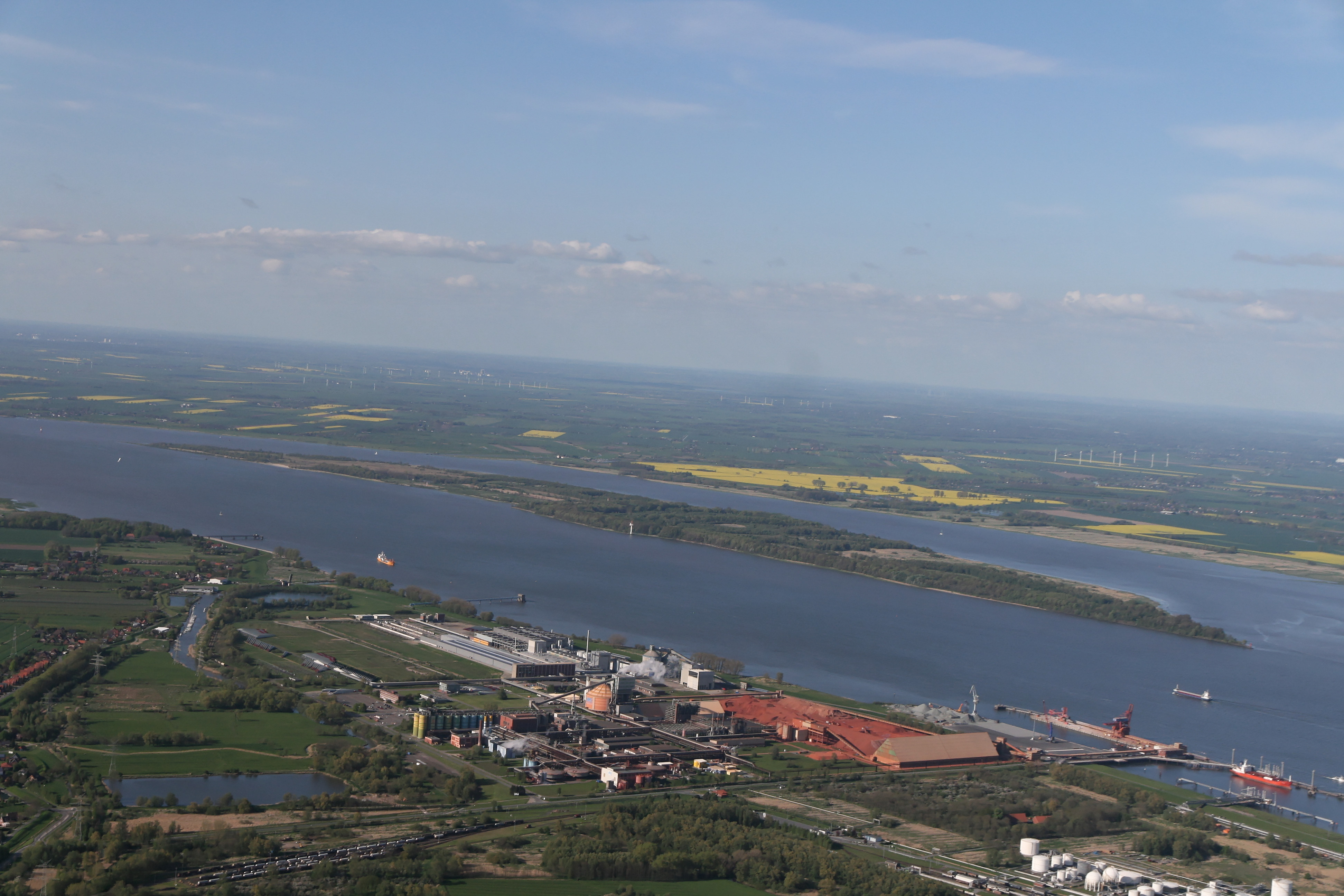 Blick von Süüdsüüdwesten op dat Industrierebeed Bützfleet mit dat Gelänn von de AOS. De Haven Bützfleet an de Elv is rechts, in'n Achtergrund is Pagensand.